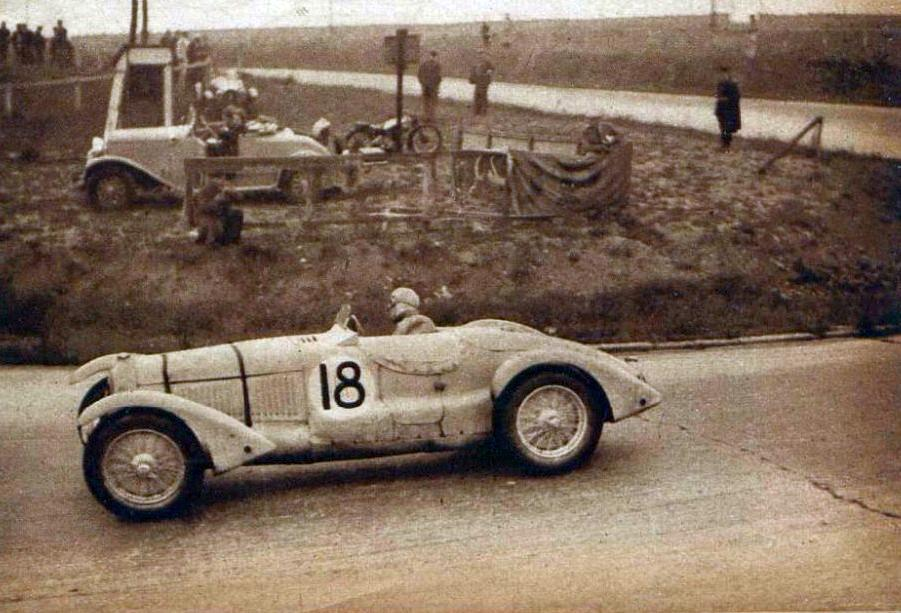 André Morel et René Le Bègue, vainqueurs des 12 Heures de Montlhéry 1938 sur Talbot Lago T26 (première Coupe Olazur).